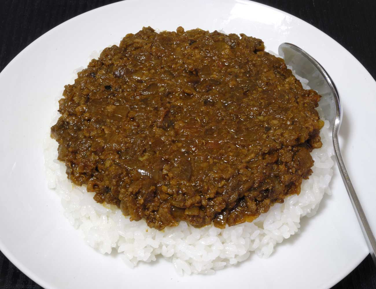 ドライカレーのうち、スパイスで味付けした挽肉と野菜を煮詰めて飯に載せるタイプ。